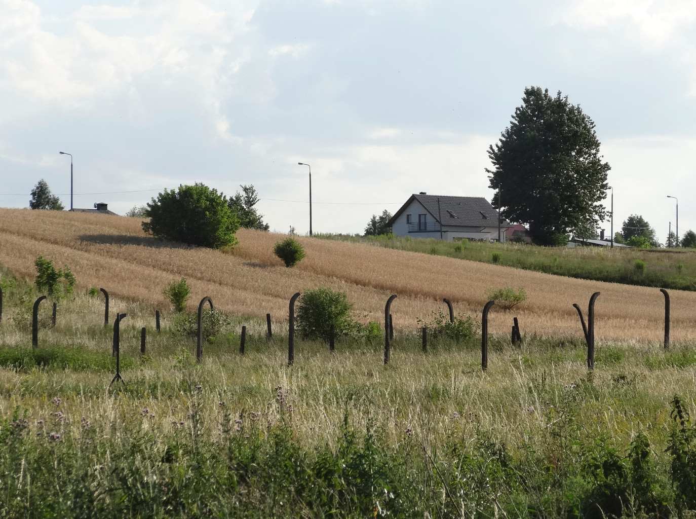 Zbocze Bydgoskie na osiedlu Prądy w Bydgoszczy